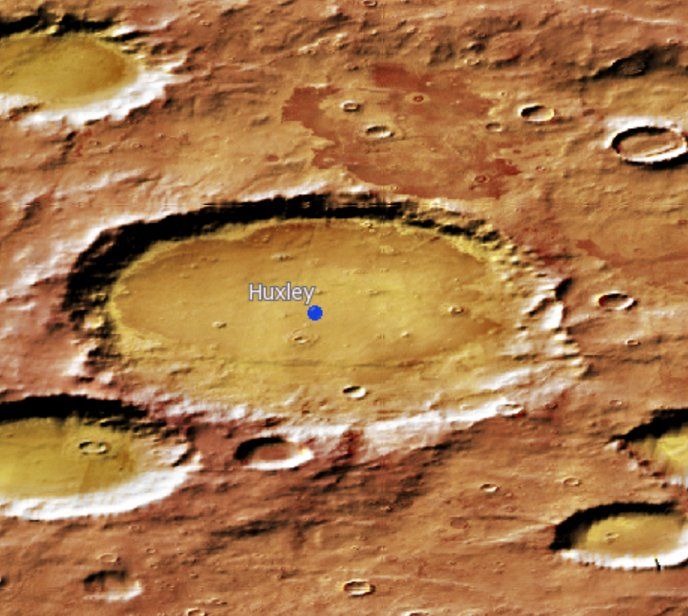 Cráter marciano Huxley. (Imagen IAU/USGS/Goddard/A SU/USGS)